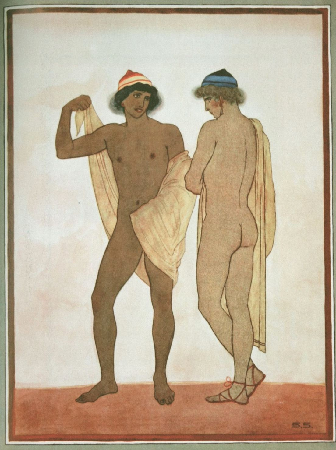 Sascha Schneider Kallisthenie 1923